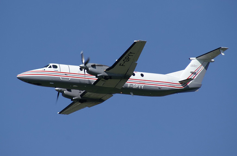 Beechcraft B1900C d'Atlantique Air Assistance